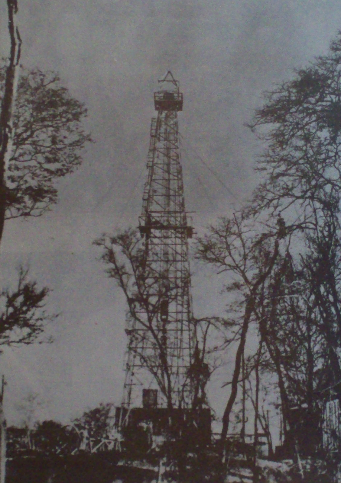 Es una foto de un pozo petrolero en Campo Durán.